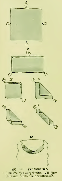 Fig. 151. Periodenbinde. I Zum Waschen ausgebreitet. VII Zum Gebrauch gefaltet mit Taillenband.